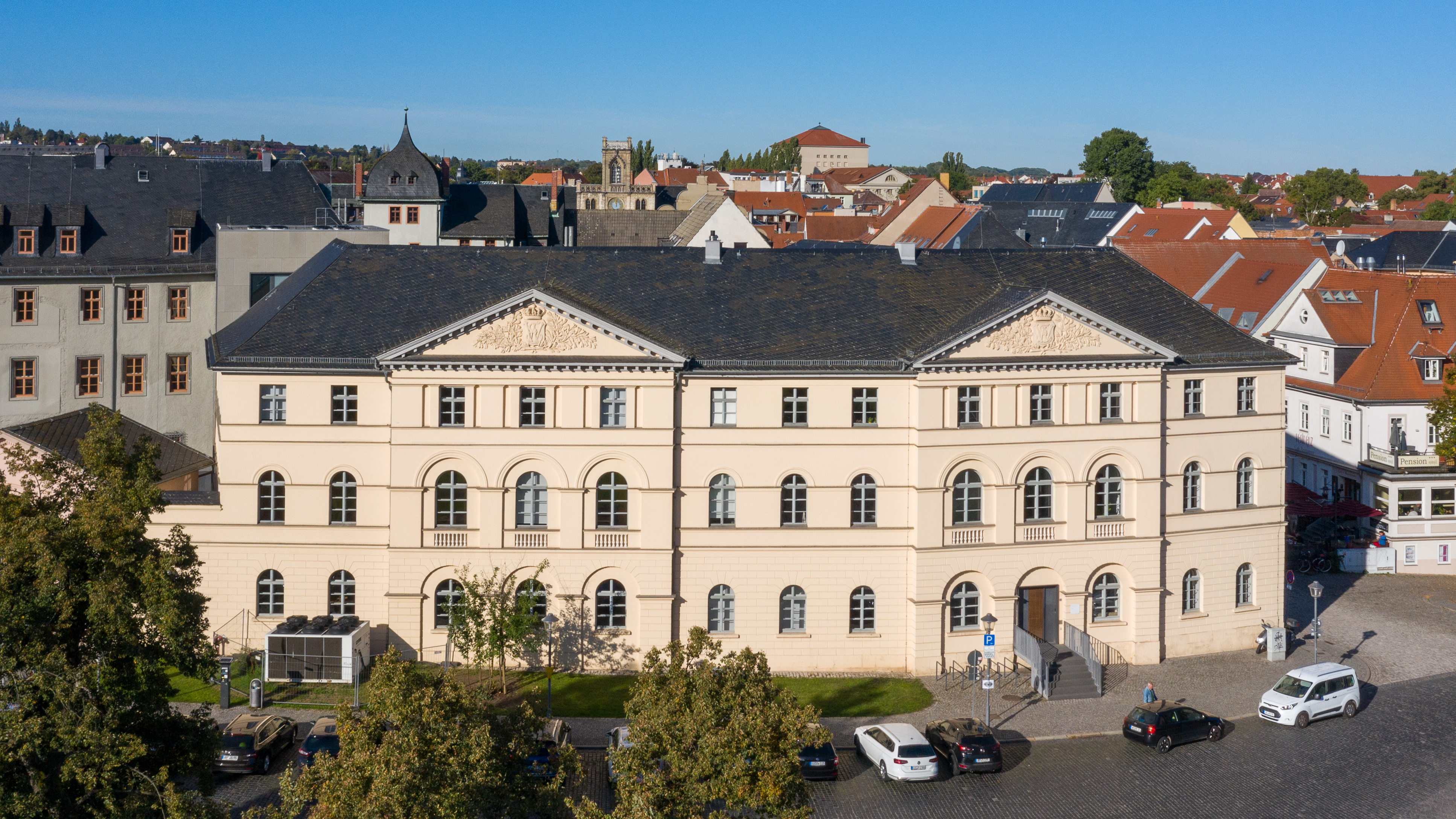 Gelbes Schloss Weimar, Ansicht vom Platz der Demokratie